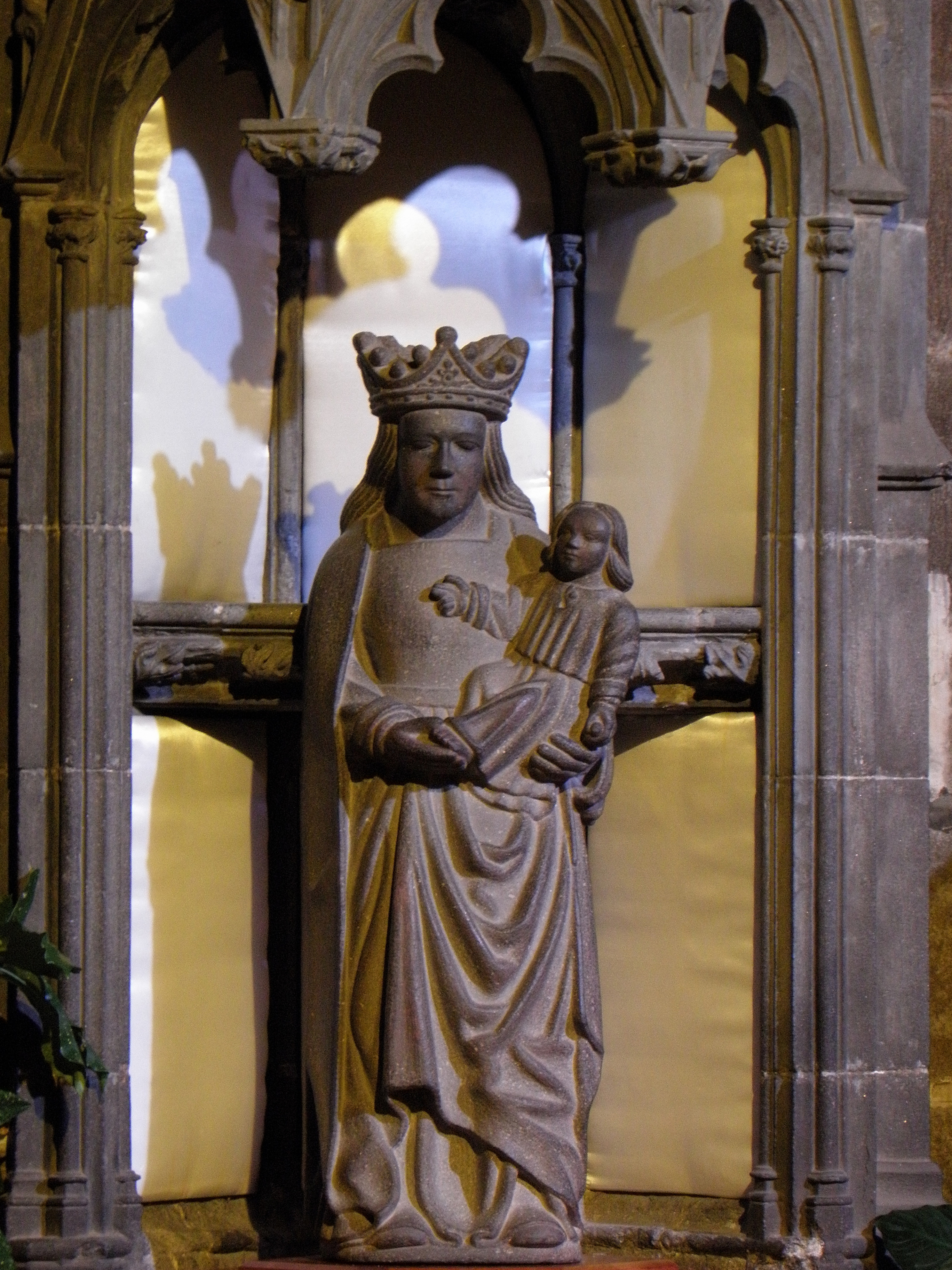 Statue de N.D. du Folgoët en la basilique éponyme.